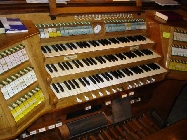 Spieltisch der Sauer-Orgel in der Moritzkirche Halle (Saale)